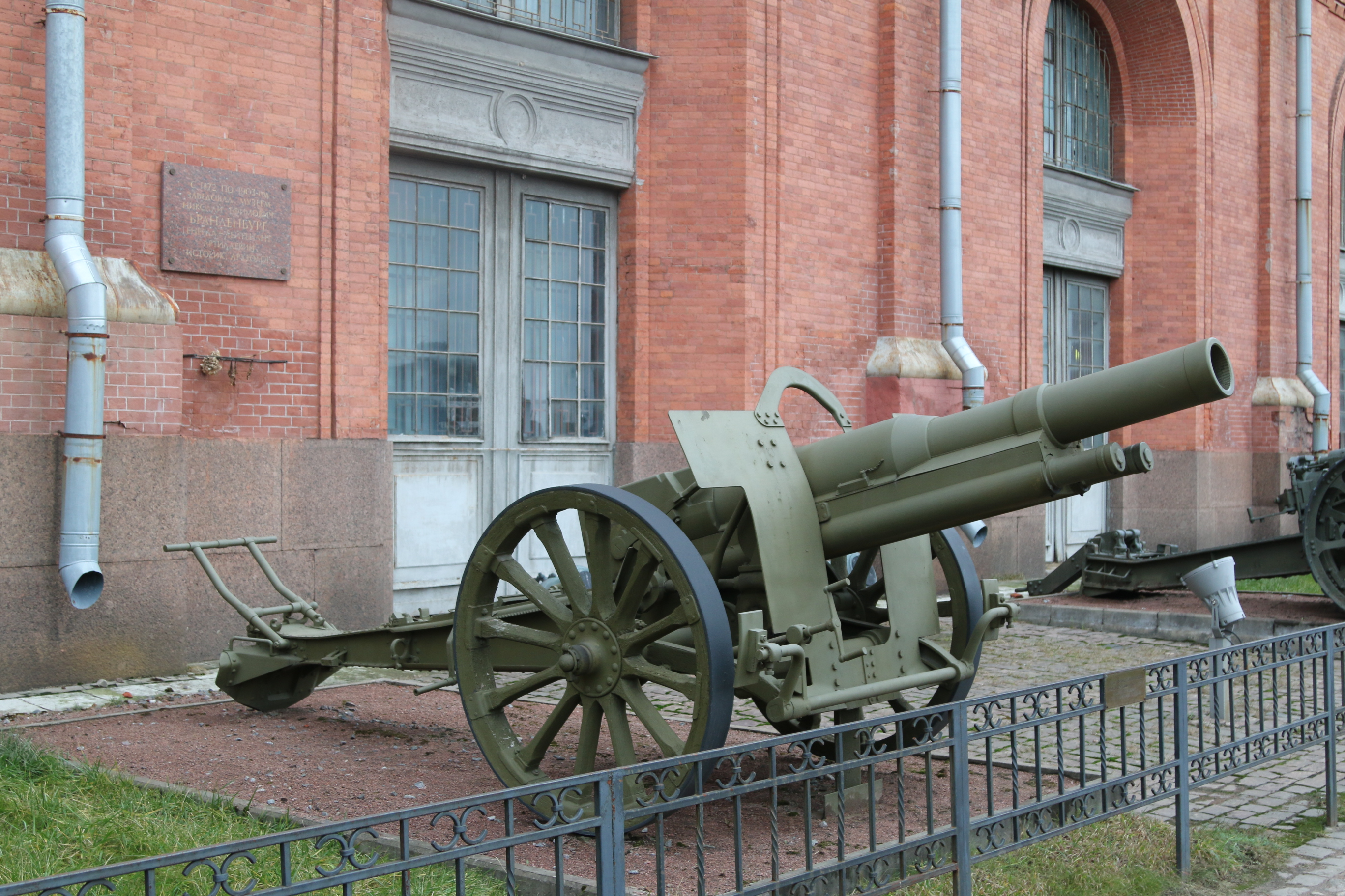 155 мм французская полевая гаубица Сен Шамон обр. 1915 года.